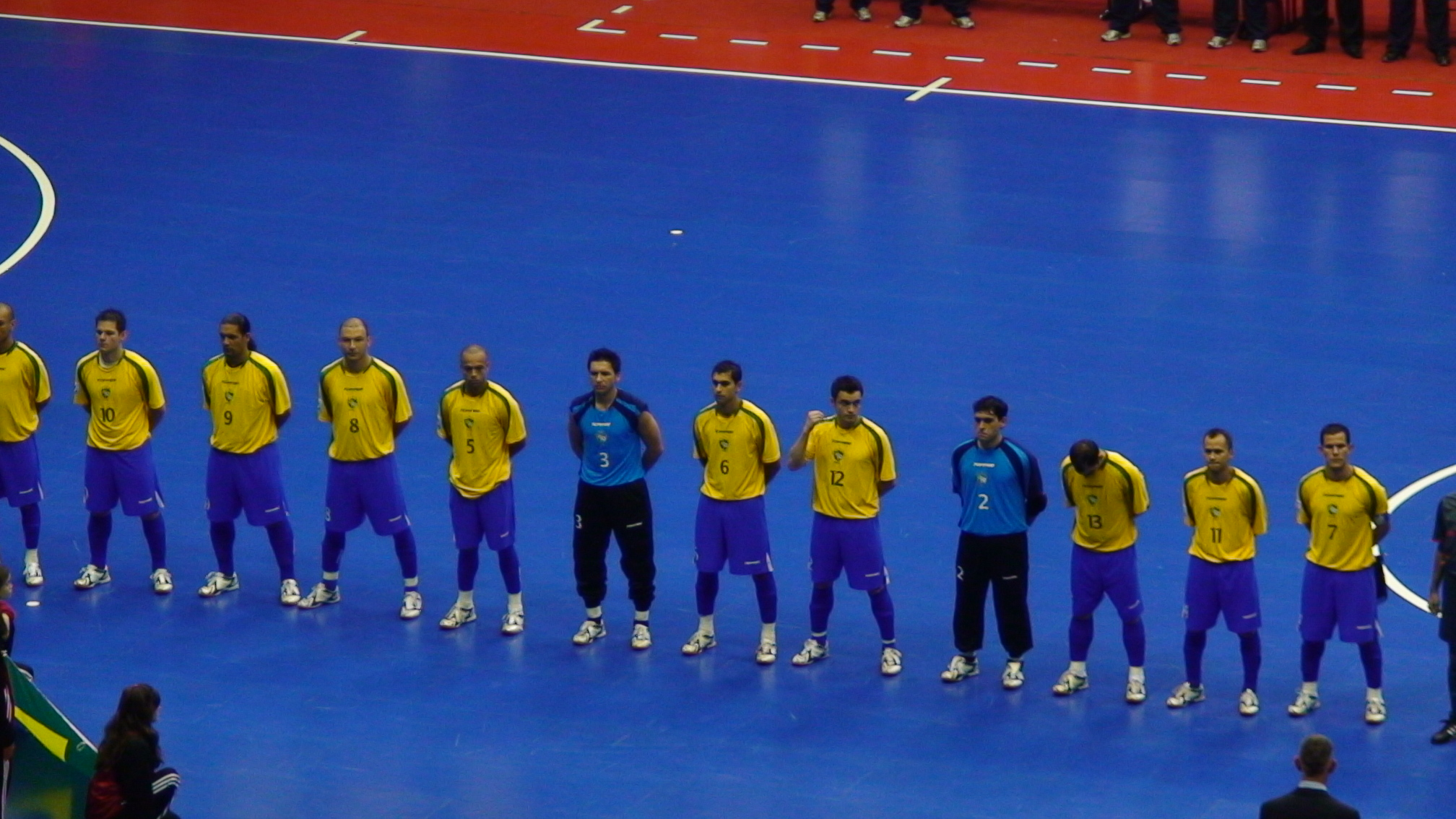 Seleção Brasileira de Futsal, em partida contra o selecionado russo, em partida válida pela primeira fase da Copa do Mundo de Futsal Fifa 2008.